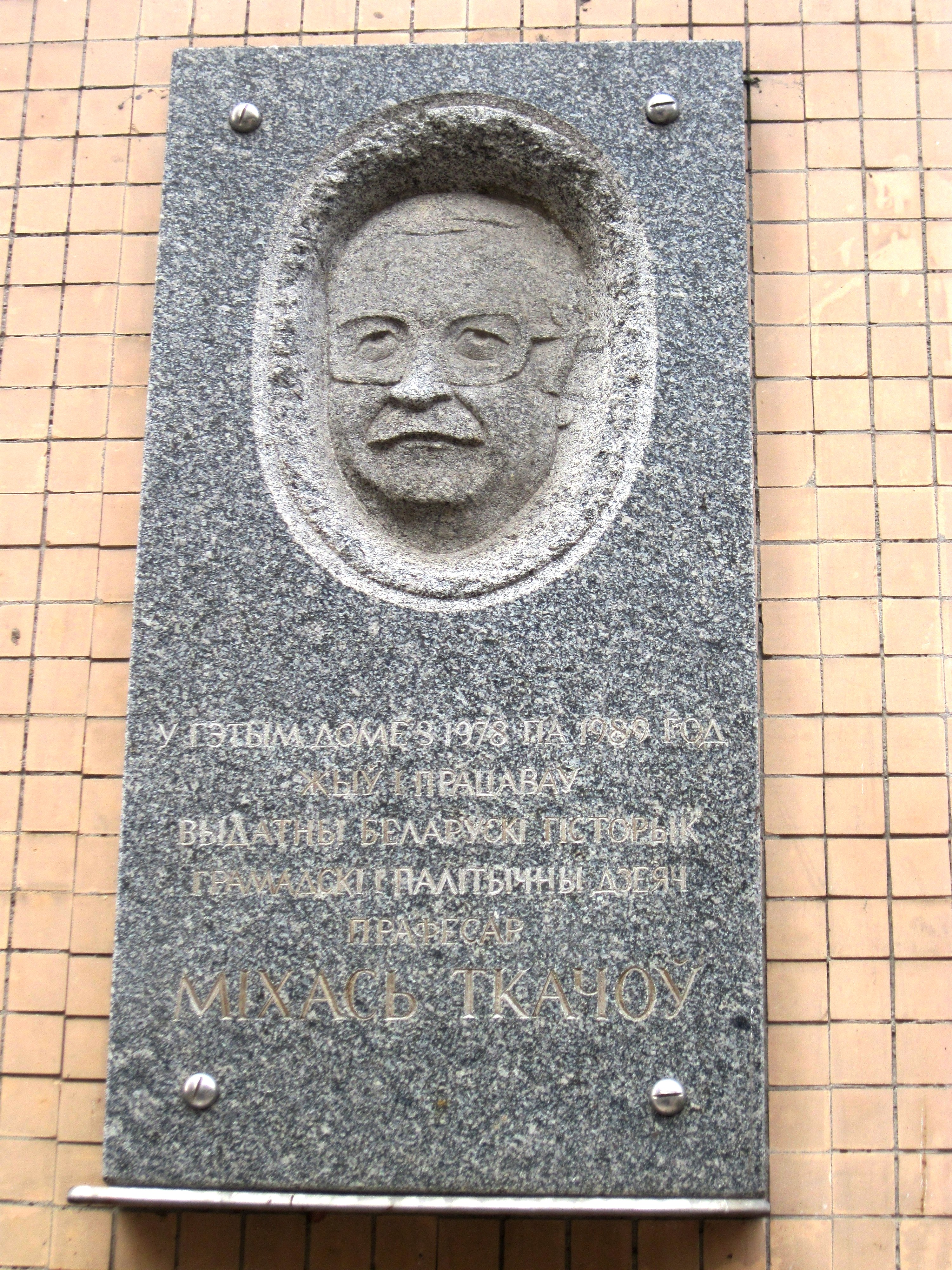 Мемарыяльная дошка М. Ткачову, Гродна, Будаўнікоў, 23